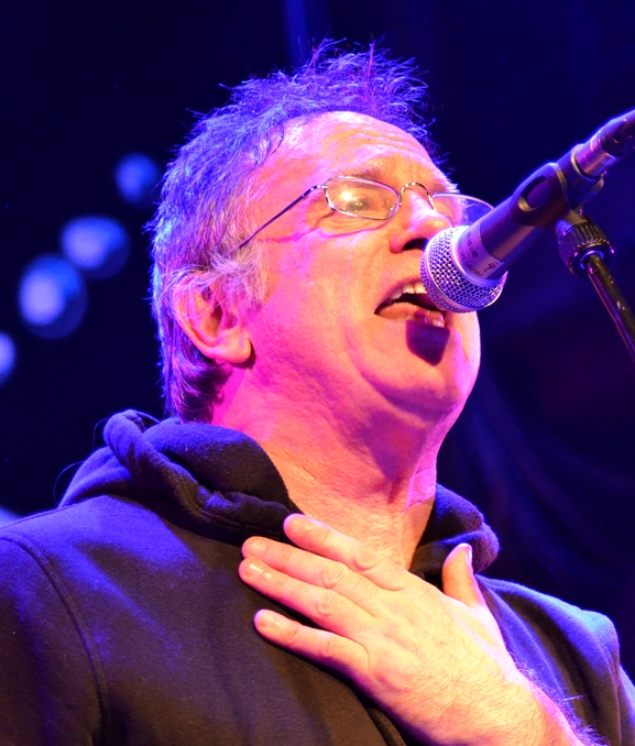 Sänger Ian Cussick - Hamburg 2012